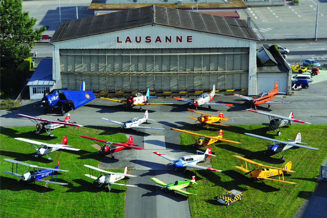 @Joe Rimensberger Les avions historique pose fièrement pour les 30 ans de l'AMPA devant le hangar "Lausanne" Lausanne Airport, Vaud, Switzerland